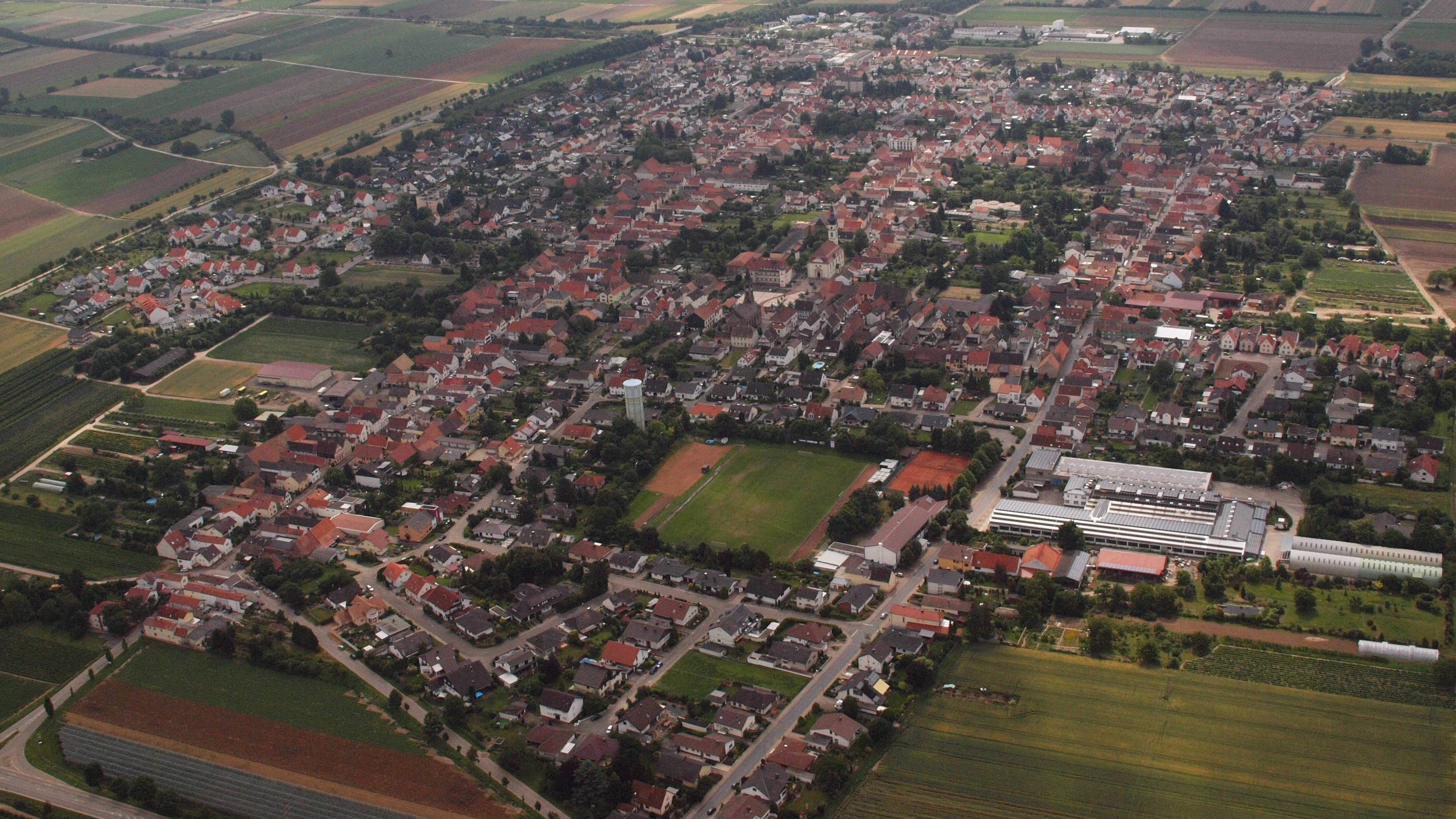 Böhl-Iggelheim: Luftaufnahme